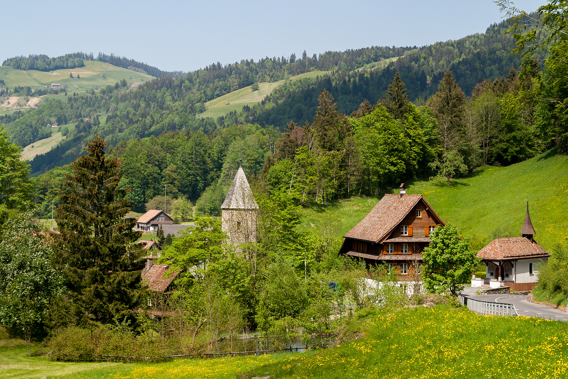 Schoren in Morgarten mit Letziturm, Morgartenhaus und Schlachtkapelle